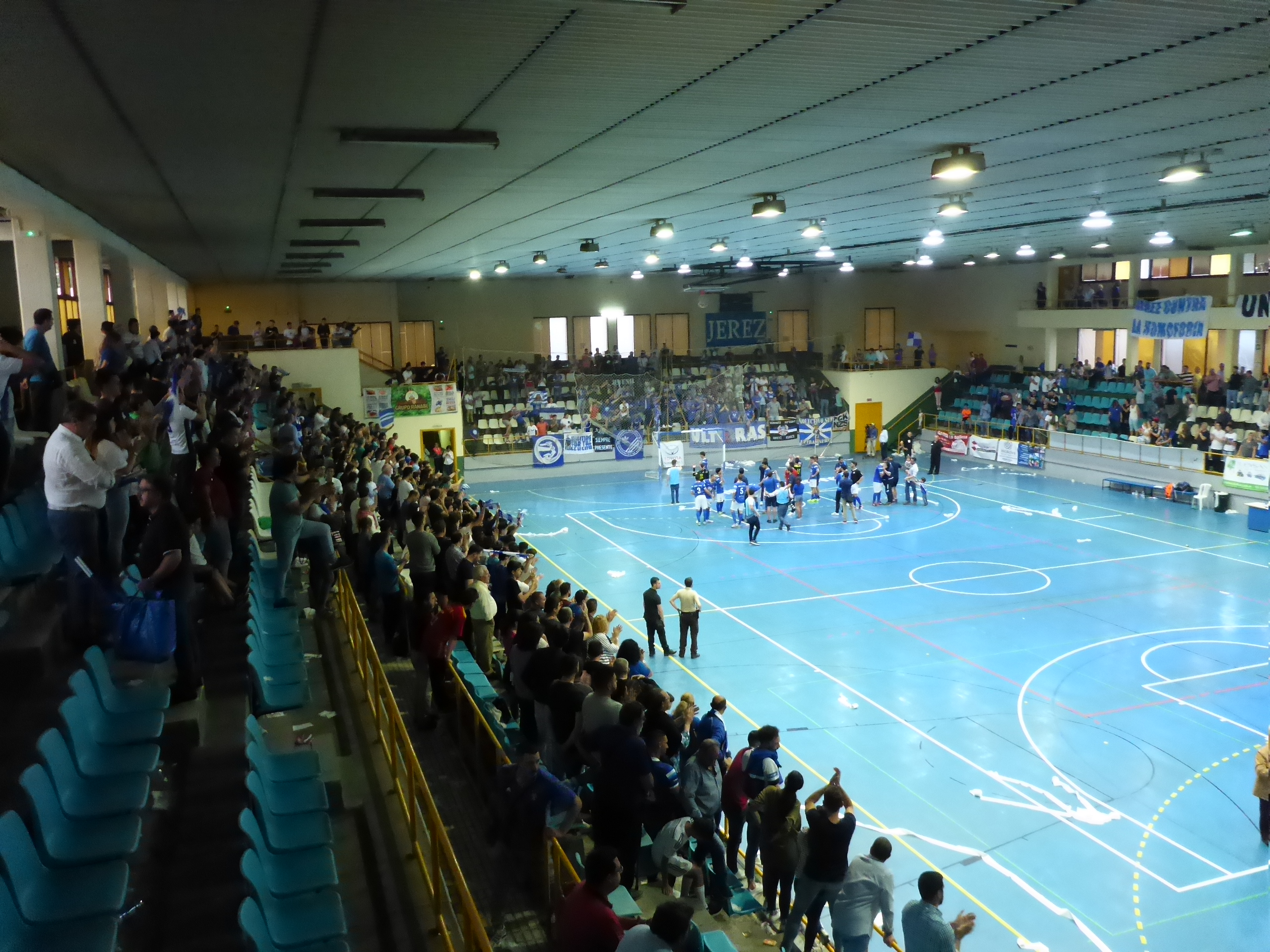 Partido de vuelta de la promoción de ascenso a Segunda División de Fútbol Sala Española entra Xerez DFC y Talavera (Jerez de la Frontera)